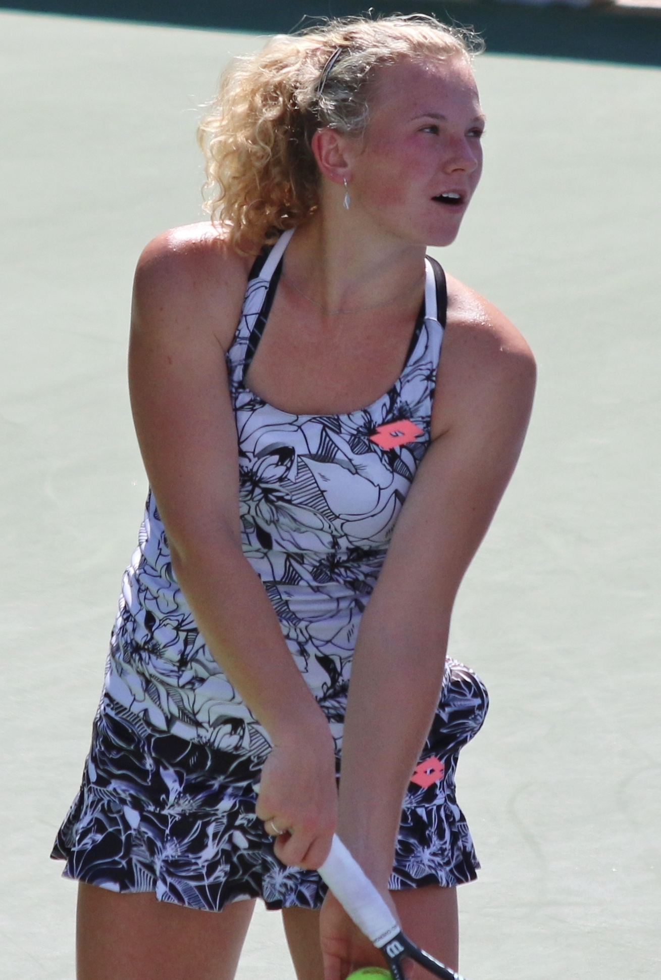 Siniakova US16 (13)